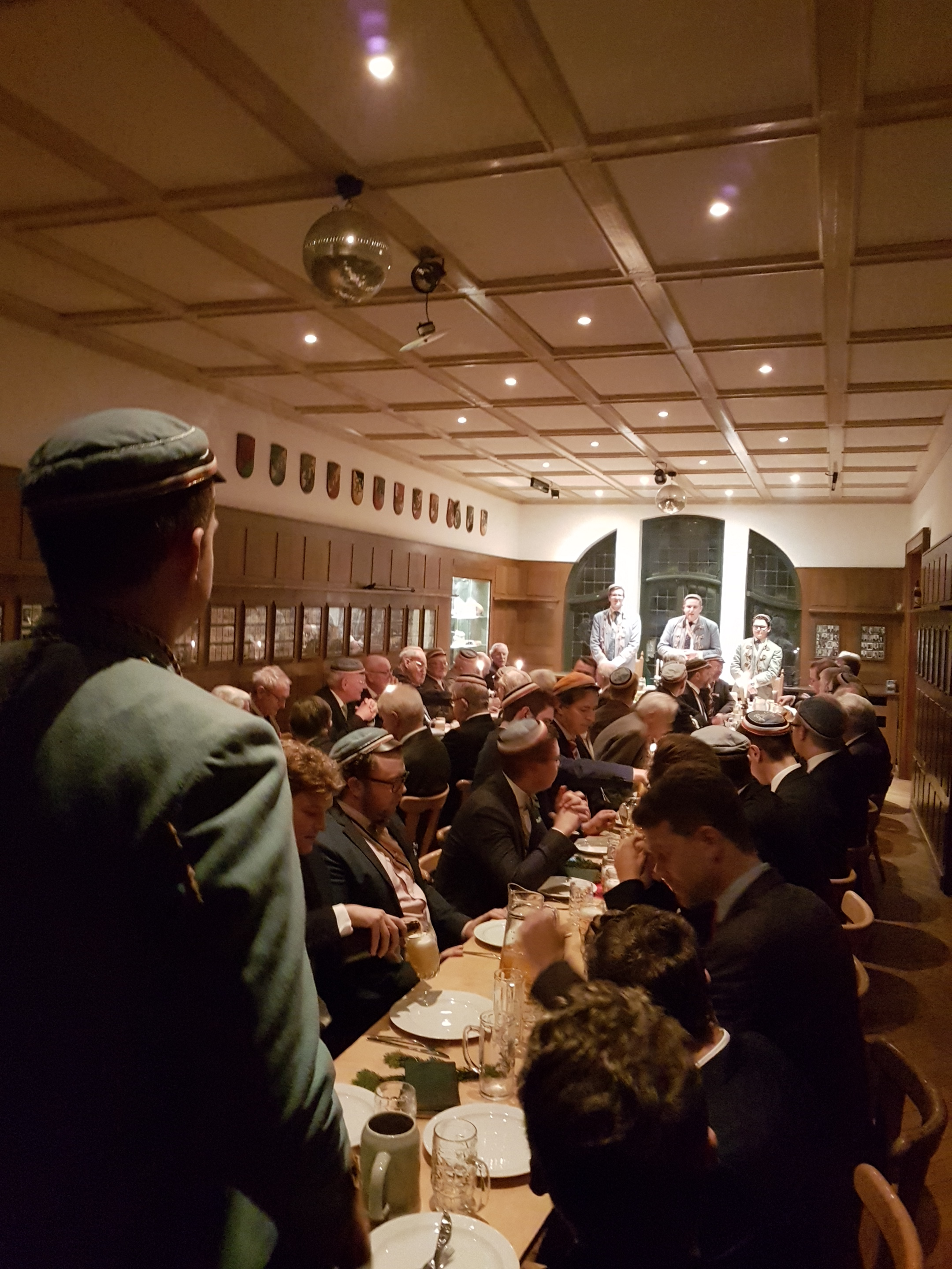 Versammlung der Mitglieder des Corps Palaiomarchia-Masovia anlässlich ihrer traditionell im Dezember jeden Jahres auf dem Corpshaus in Kiel stattfindenen Grünkohlkneipe mit dem Fuchsmajor im Vordergrund und den 3 Chargierten im Präsidium im Hintergrund.